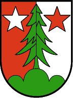 Schröcken, Vorarlberg: In einem von Rot und Silber gespaltenen Schild auf grünem Dreiberg eine grüne Fichte, begleitet von einem silbernen und roten fünfstrahligen Stern. (Verleihung: 28. September 1965)